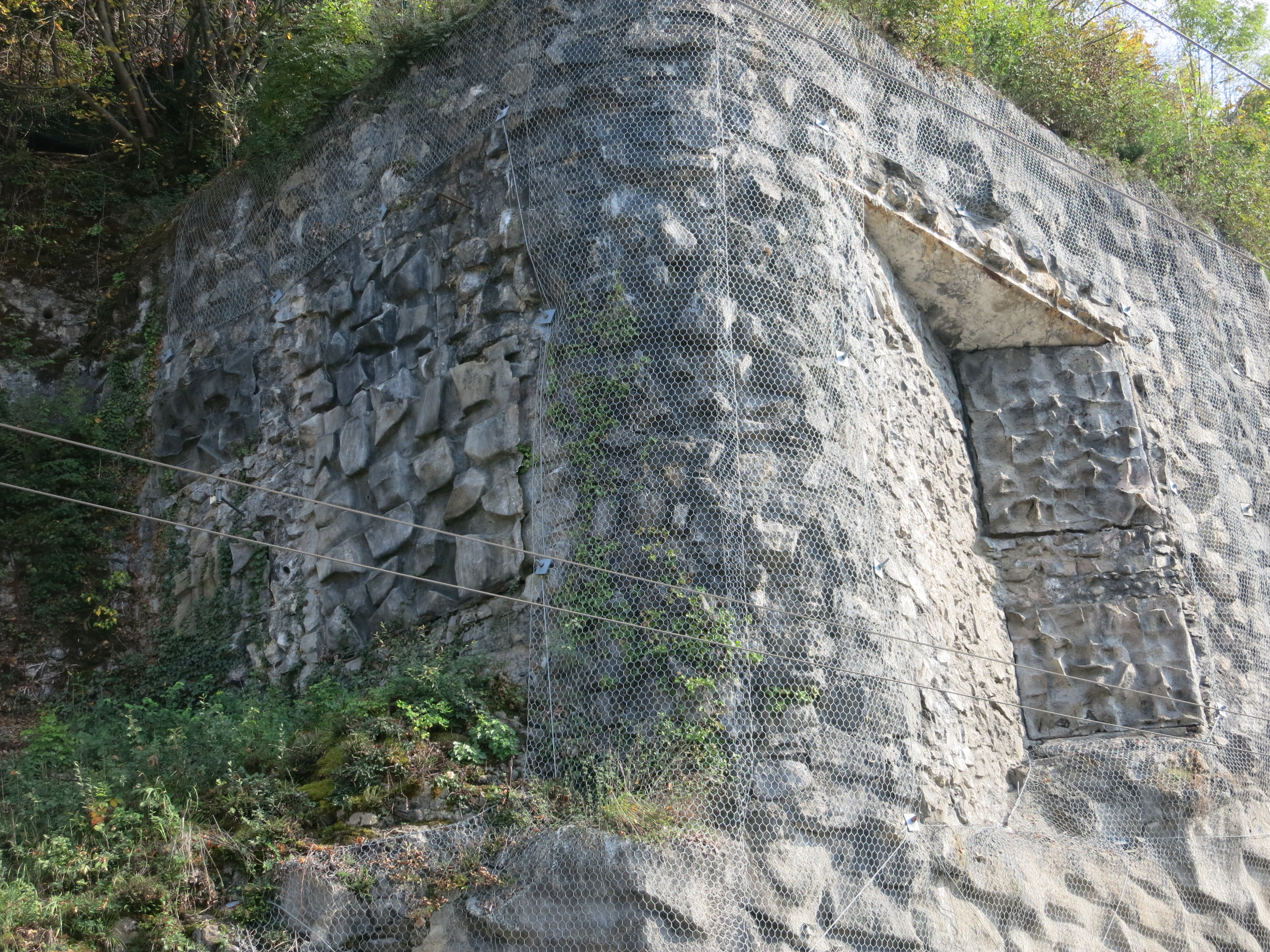 Sperrstelle Chillon VD, Schweiz